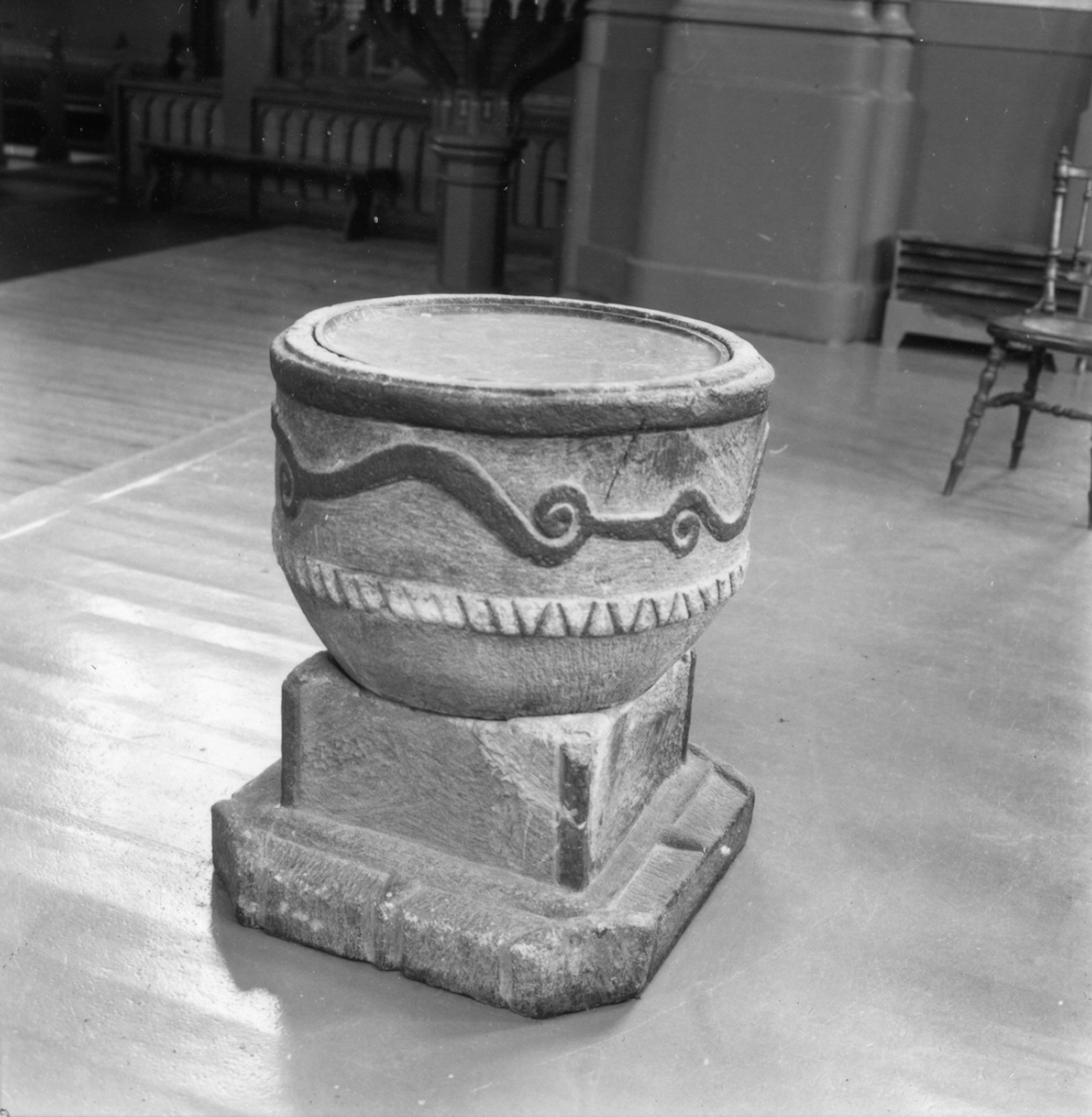 Högsäters kyrka. Dopfunt.